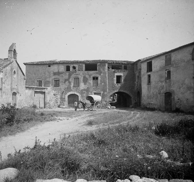 Una masia de Morell. Josep Salvany i Blanch (1919)